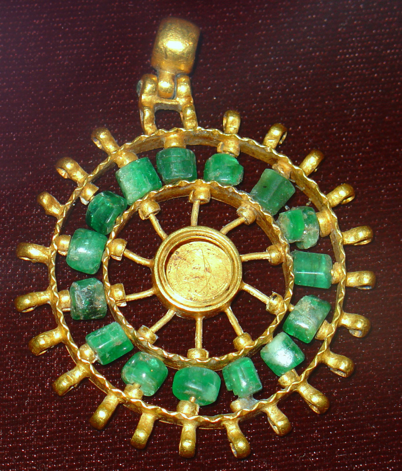 Médaillon datant de l'époque byzantine et faisant partie du trésor de Véliki Preslav. Exposé au musée archéologique de Preslav - Bulgarie